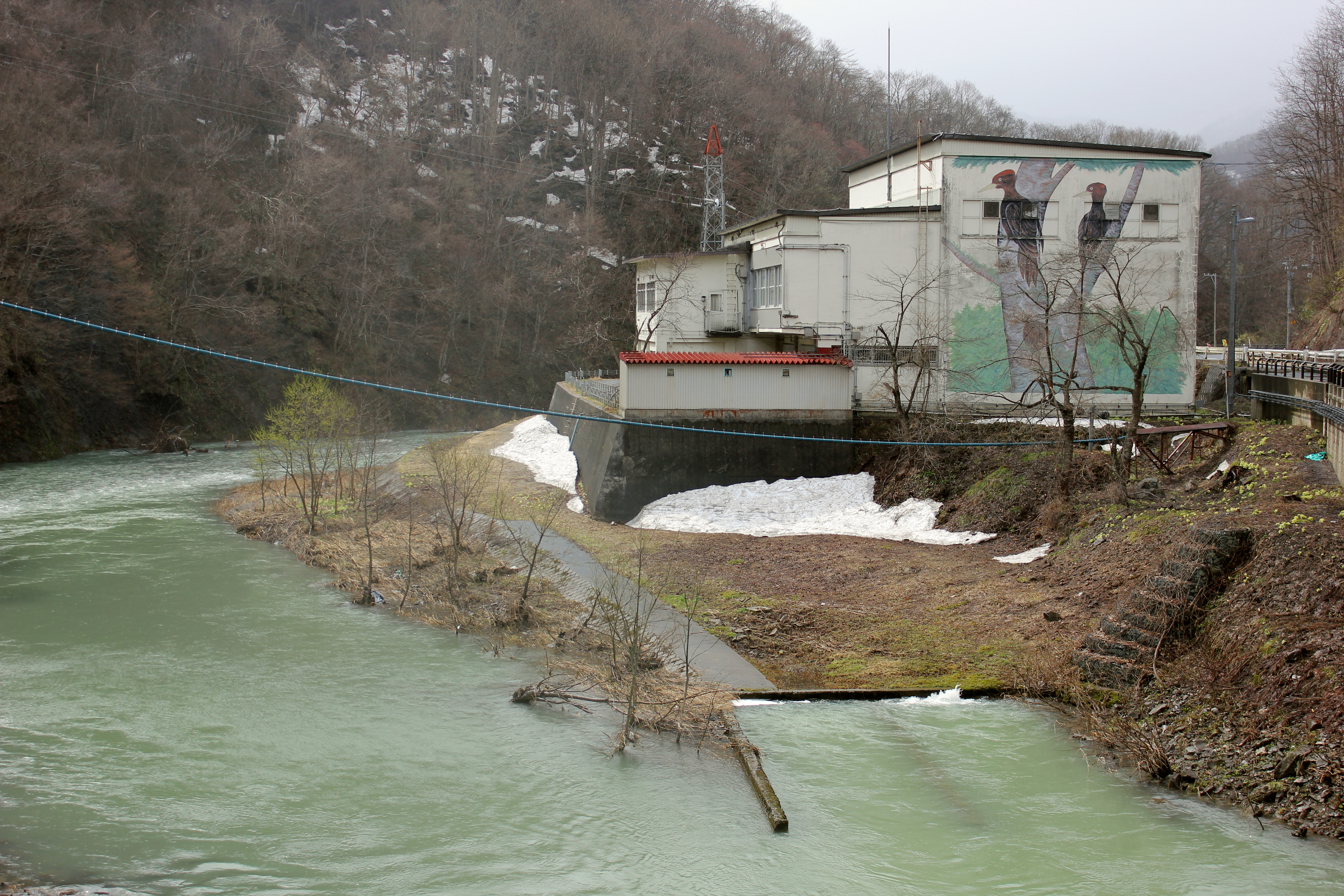 東北電力岩木川第一発電所